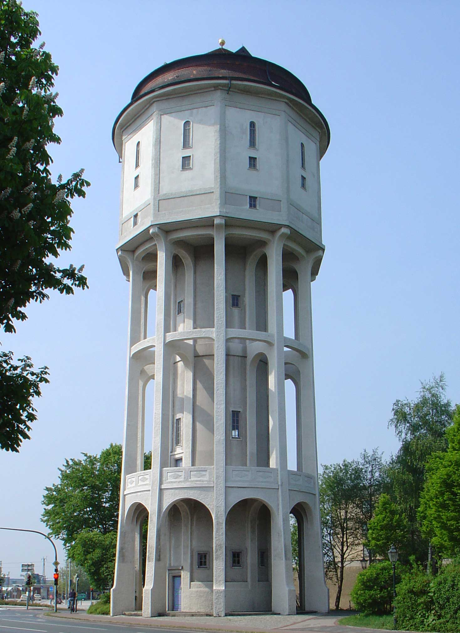 Watertoren Emden (Wasserturm Emden, Watertower Emden)